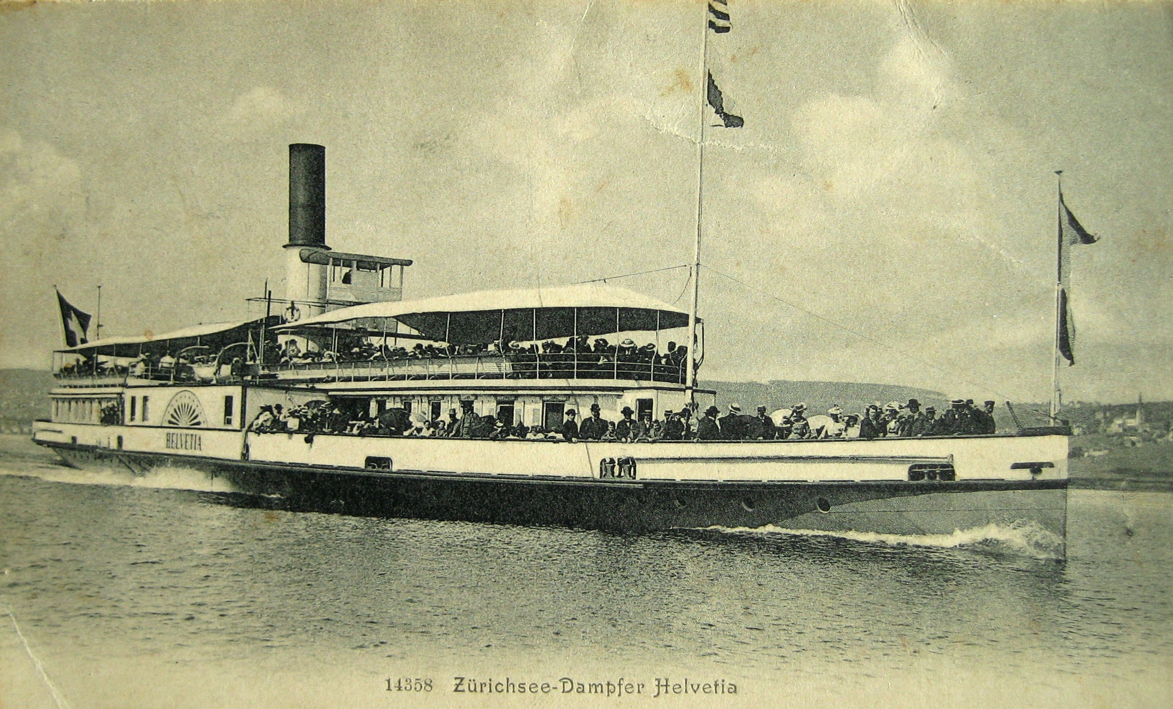 Salondampfer Helvetia 1907